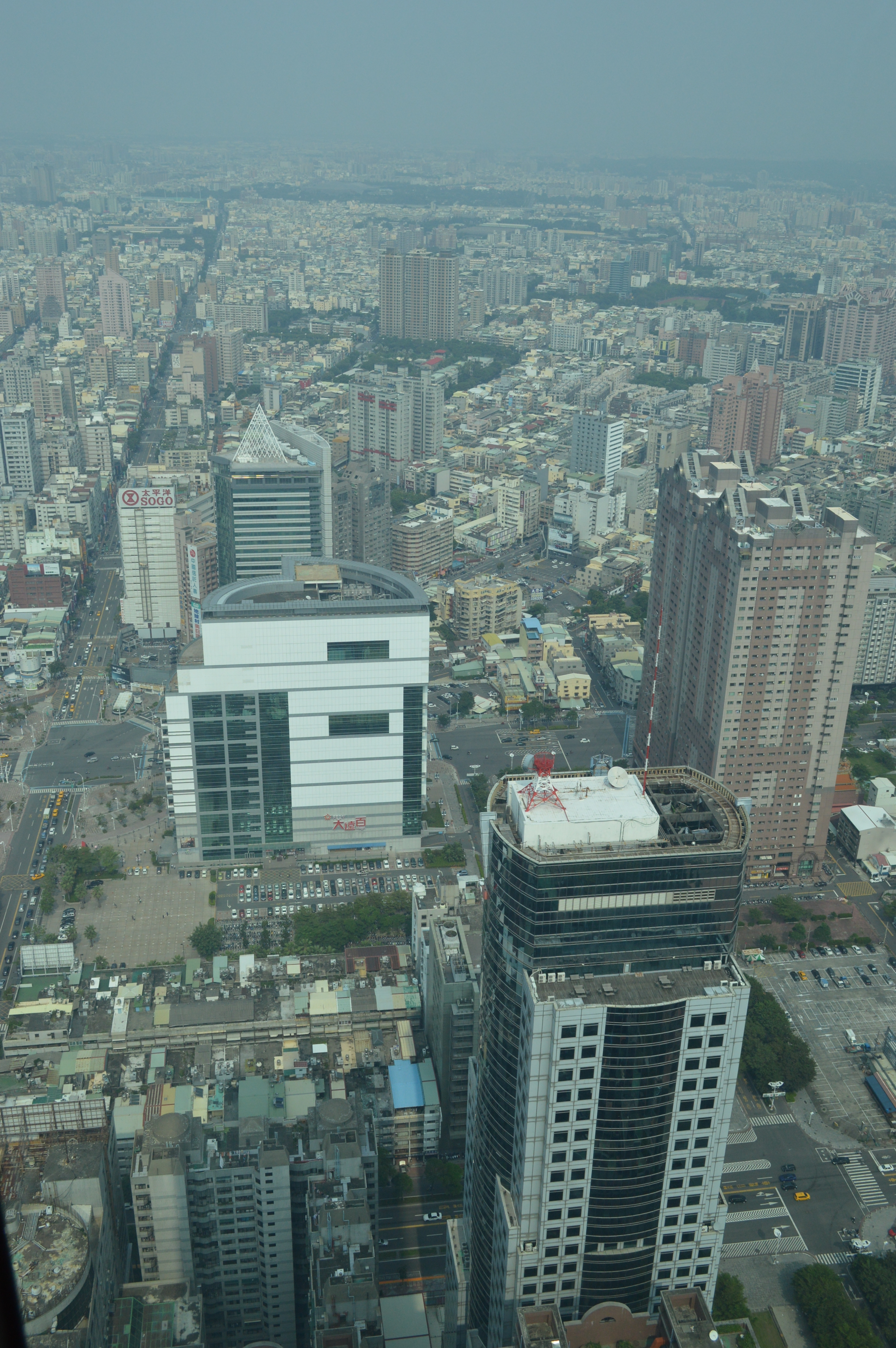 高雄85ビルから見下ろす高雄の街並